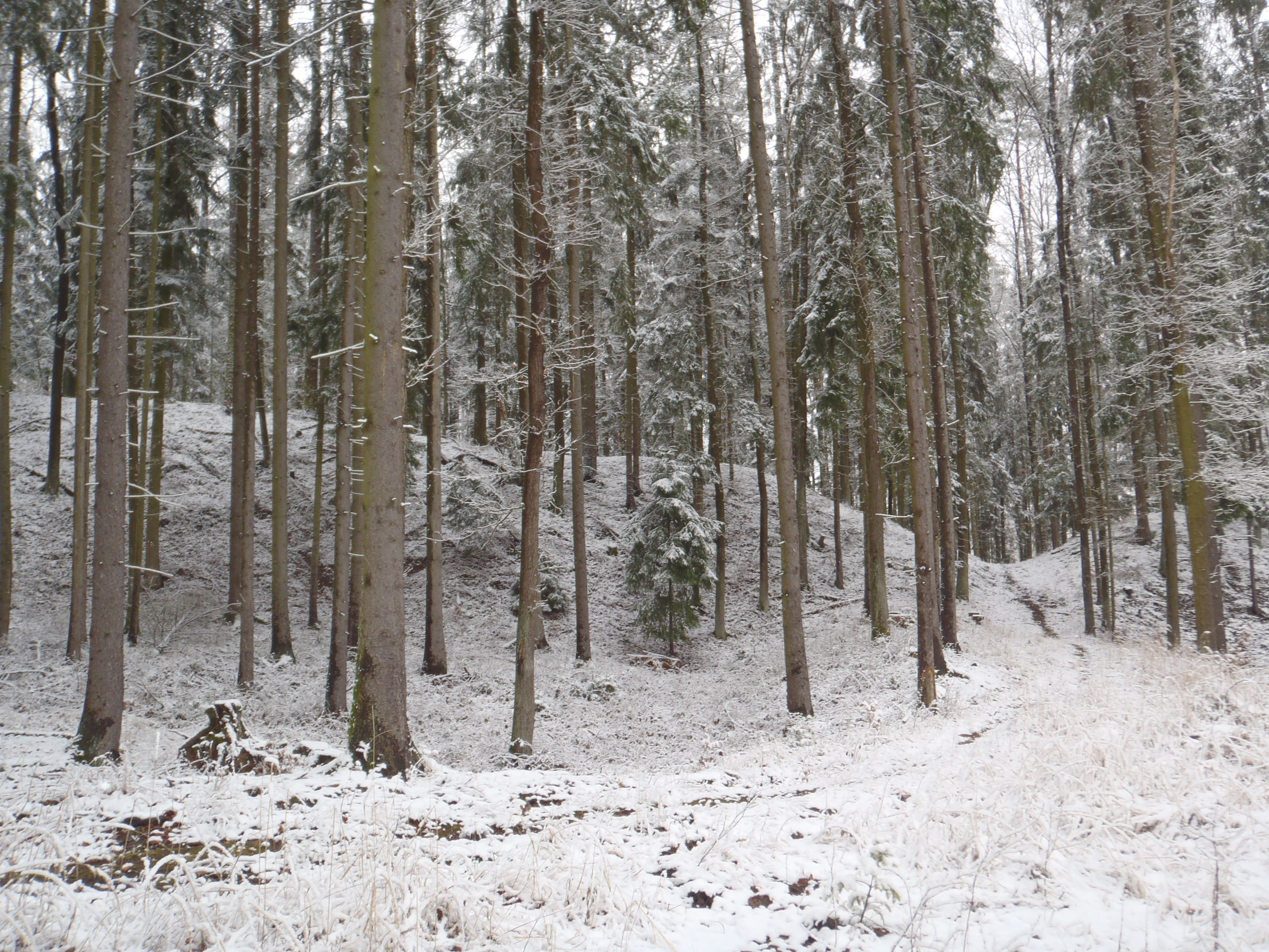 Mohutné zbytky valů a příkopů. Hradiště snad ze starší doby železné, prokázáno osídlení v raném středověku (slovanské). Valy dosud místy 8 m vysoké.